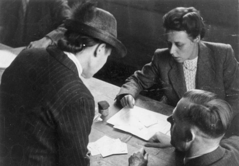 Essen, Währungsreform Ausgabe des neuen Geldes in Westdeutschland Blick in eine Ausgabestelle in Essen 1707-48